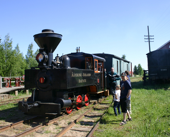 old Porter engine (builder: H.K. Porter, 1901, no. 2313, gauge: 750mm), Jokioinen Museum Railway